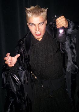 Marlon Valverde es "El Hechicero" en la ópera Dido y Aeneas" de H. Pourcell